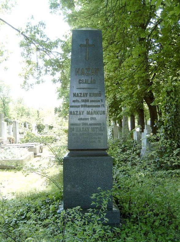 Hazay Ernő (Temesvár, 1819. április 7. – Bátorkeszi, 1889. december 17.) újságíró sírja Budapesten. Új köztemető: 28-1-50/51.